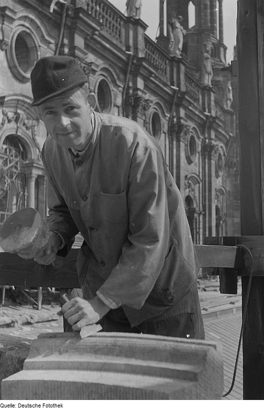 Original image description from the Deutsche FotothekSteinmetz auf dem Seitenschiffdach der Hofkirche